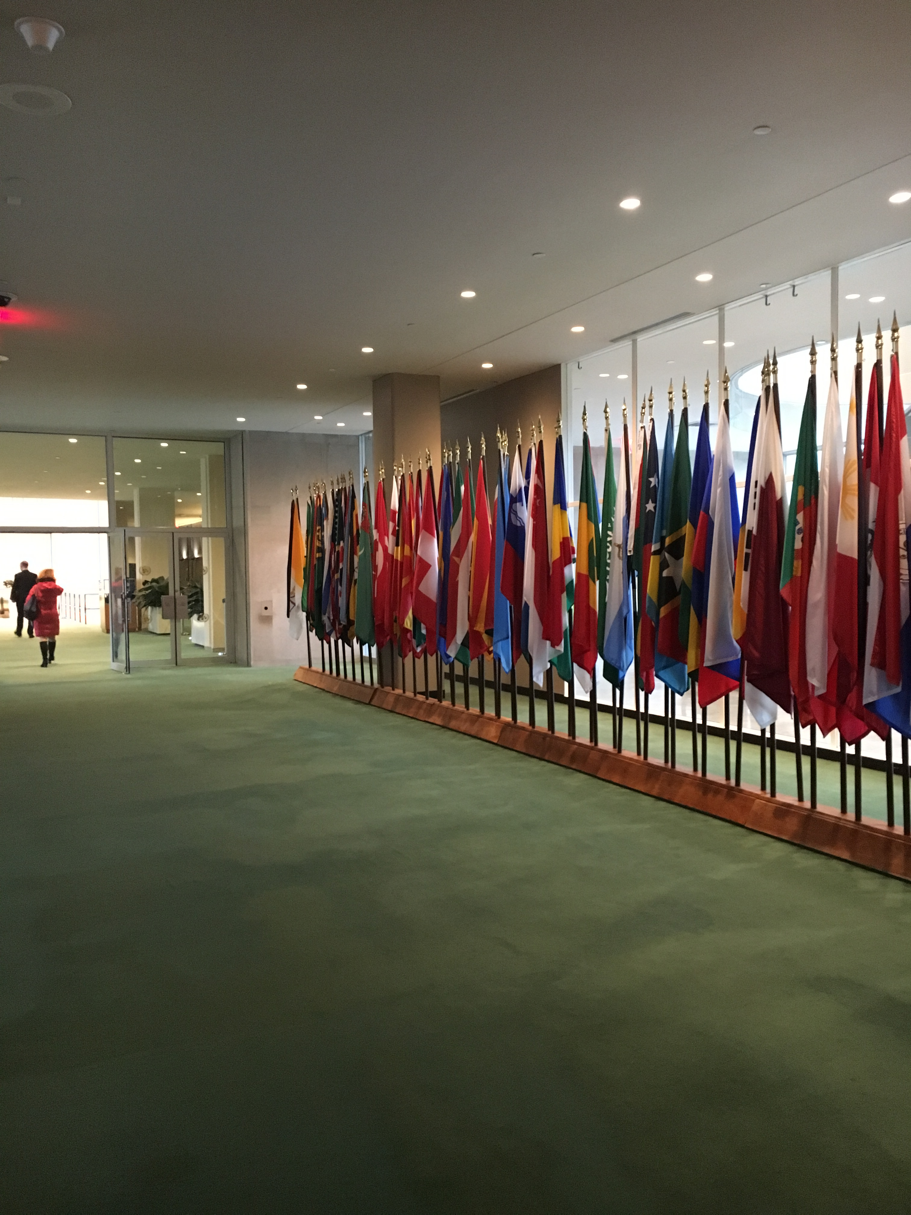 Флаги в ООН